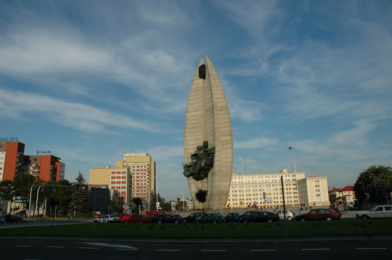 Rzeszów - Cieplinskiego Street 2005